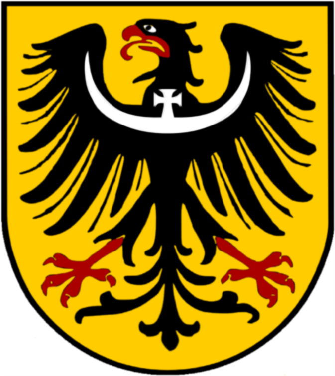 Wappen Schlesiens Schläsch: Woappa vo Schläsing